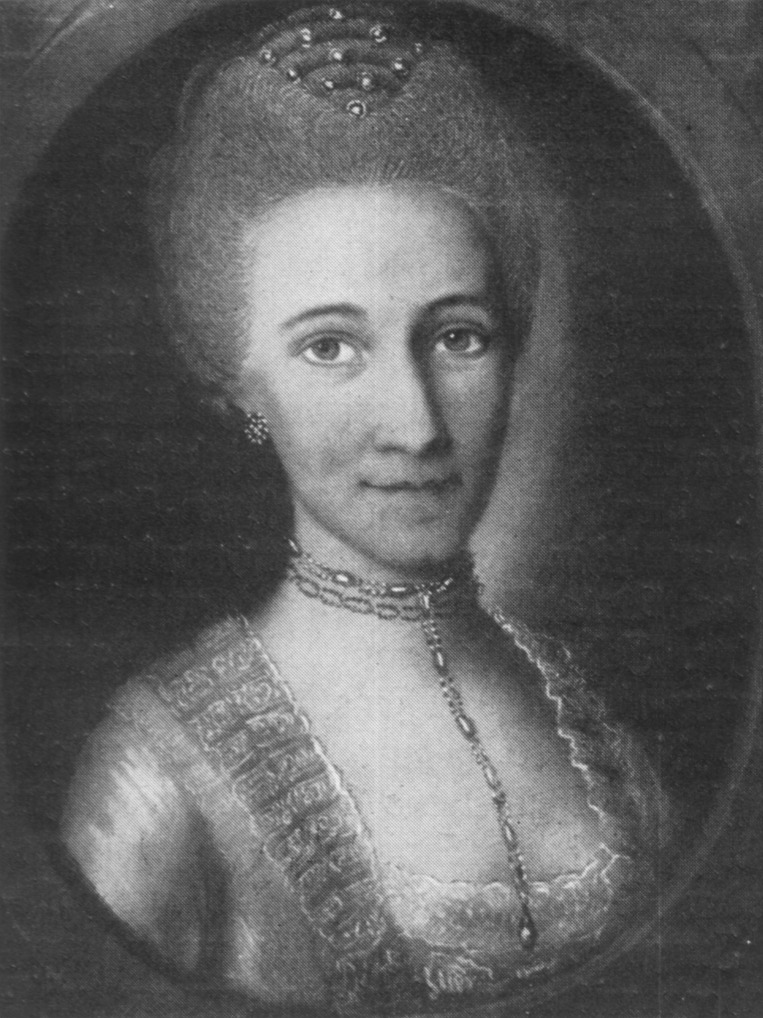 Originalbildunterschrift: Schinkels Eltern. Unbekannter Maler, Pastellgemälde. Hier: Schinkels Mutter: Dorothea Schinkel, geb. Rose (1749–1800), vgl. Neue Deutsche Biographie. Band 22, Berlin 2005, S. 795